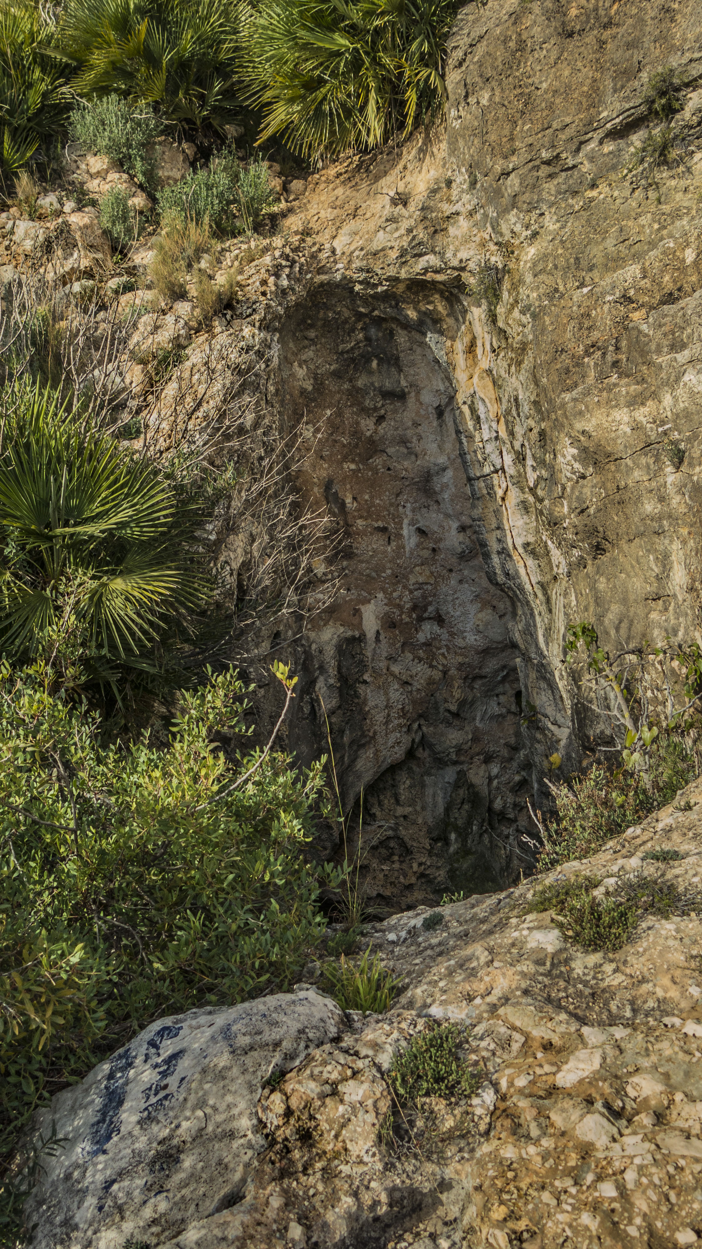 Entrada de l'Avenc de l'Infern (o Cova de Primo), situat al sud del Quencall, Matamon.